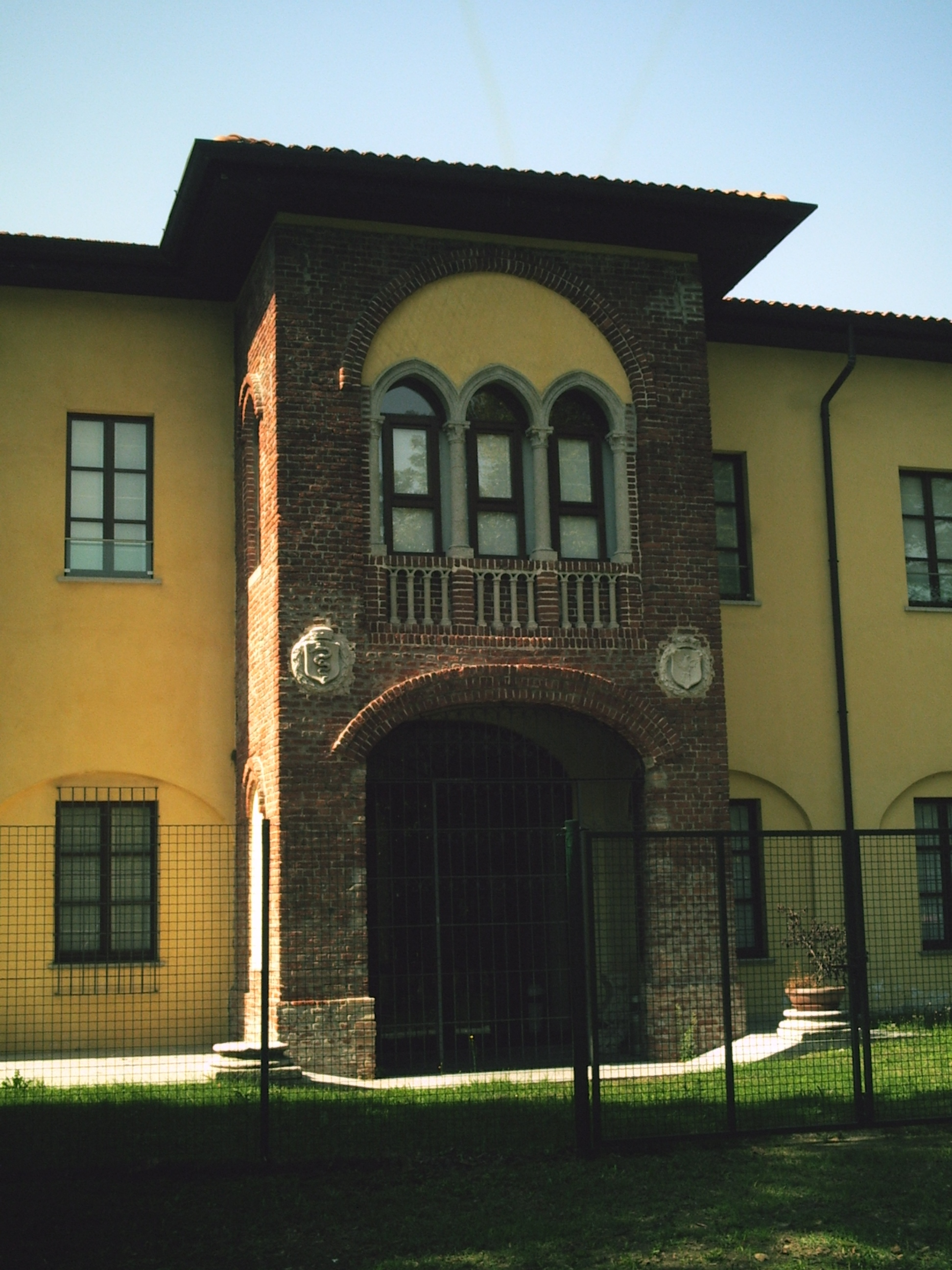 Portone posteriore di Villa Corvini